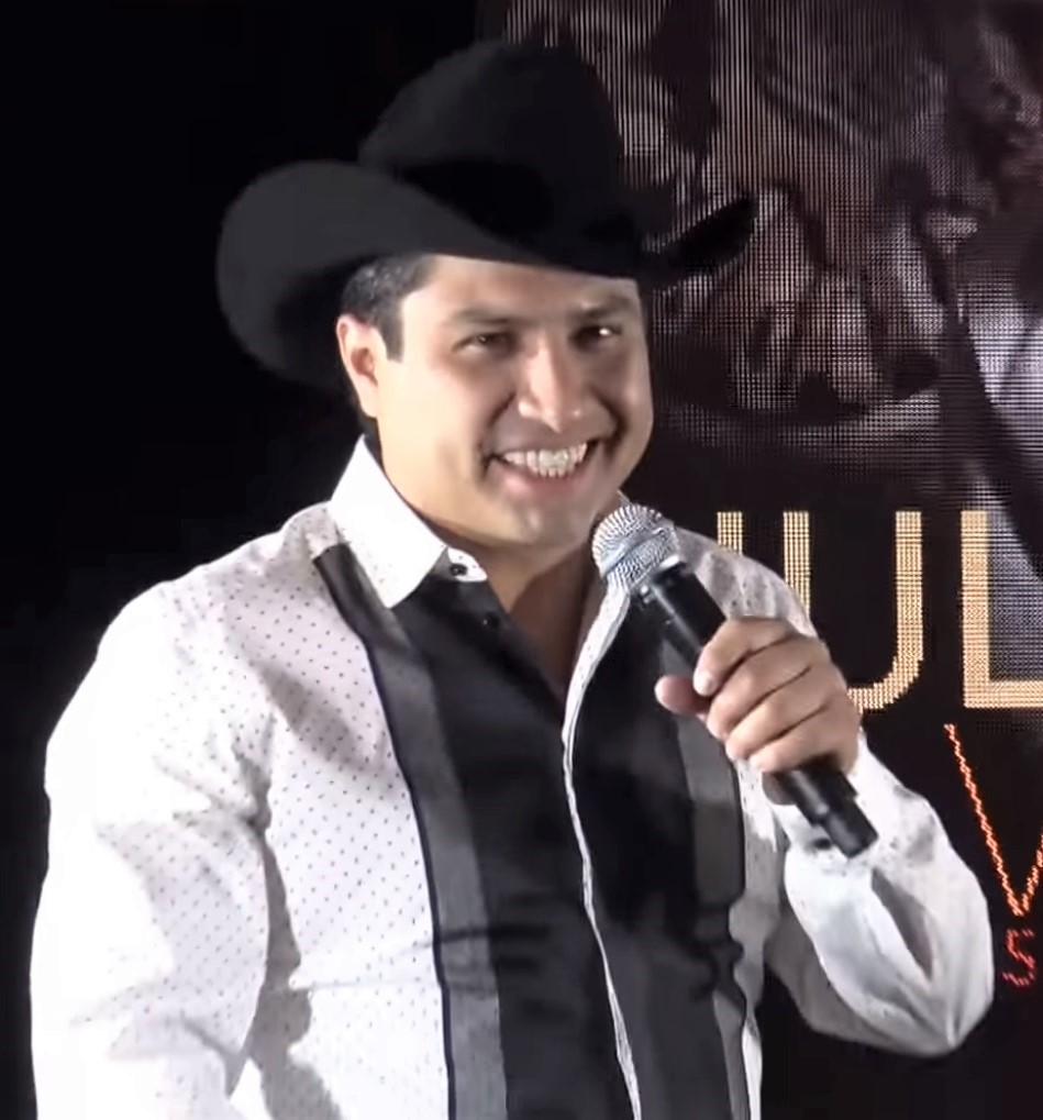 JULION ÁLVAREZ-CONFERENCIA DE PRENSA SOBRE COMENTARIO MACHISTA Julión Álvarez ahora se muerde la lengua antes de hablar de mujeres, VER CONFERENCIA DE PRENSA COMPLETA DE JULION ÁLVAREZ: El rey de la taquilla ofrece conferencia de prensa en Beverly Hills Ca., donde declara por primera vez ante los medios sobre la tremenda controversia que causó en las redes sociales con las declaraciones que realizó sobre las mujeres, al asegurar que una mujer no sirve si no sabe trapear.